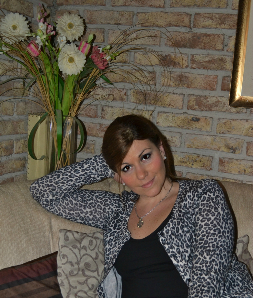 Victoria Aihar en 2015